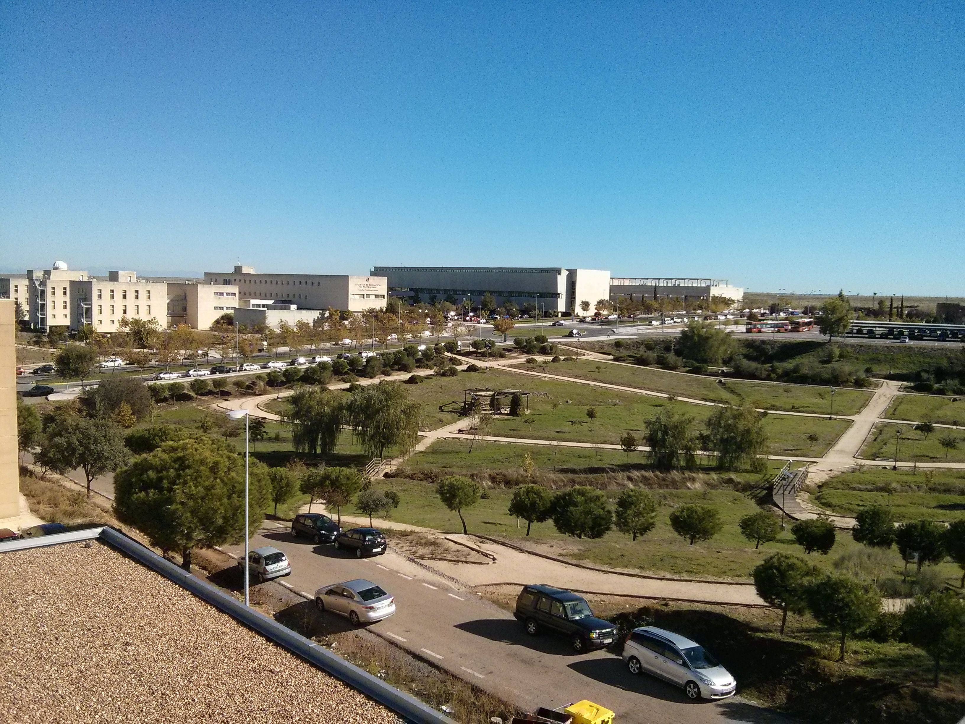 Vista de la facultad de derecho, formación del profesorado, filosofía y letras, y la biblioteca central del campus de Cáceres de la Universidad de Extremadura, en España